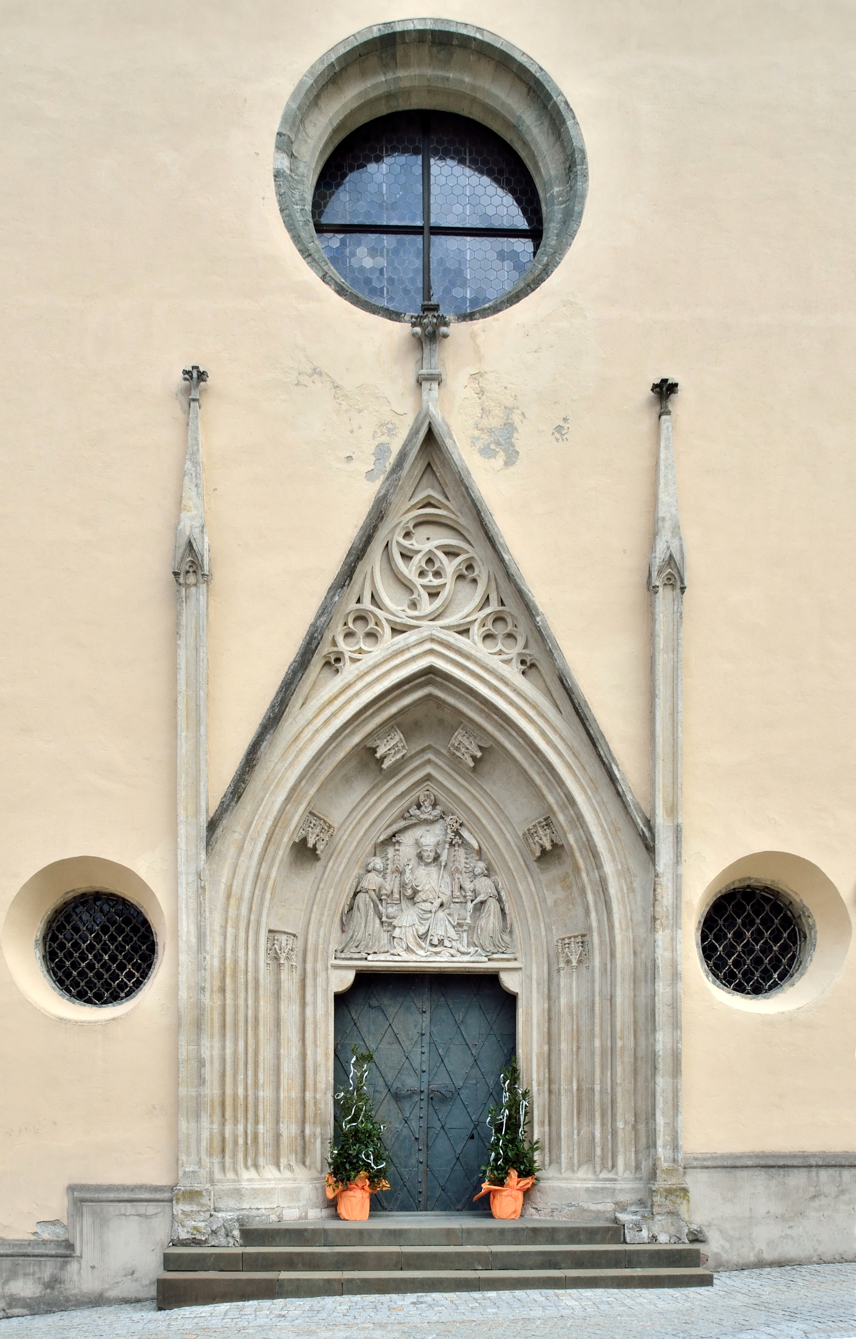 Die Pfarr- & Wallfahrtskirche St. Erhard in Sankt Erhard in der Breitenau, Gemeinde Breitenau am Hochlantsch, steht unter Denkmalschutz.